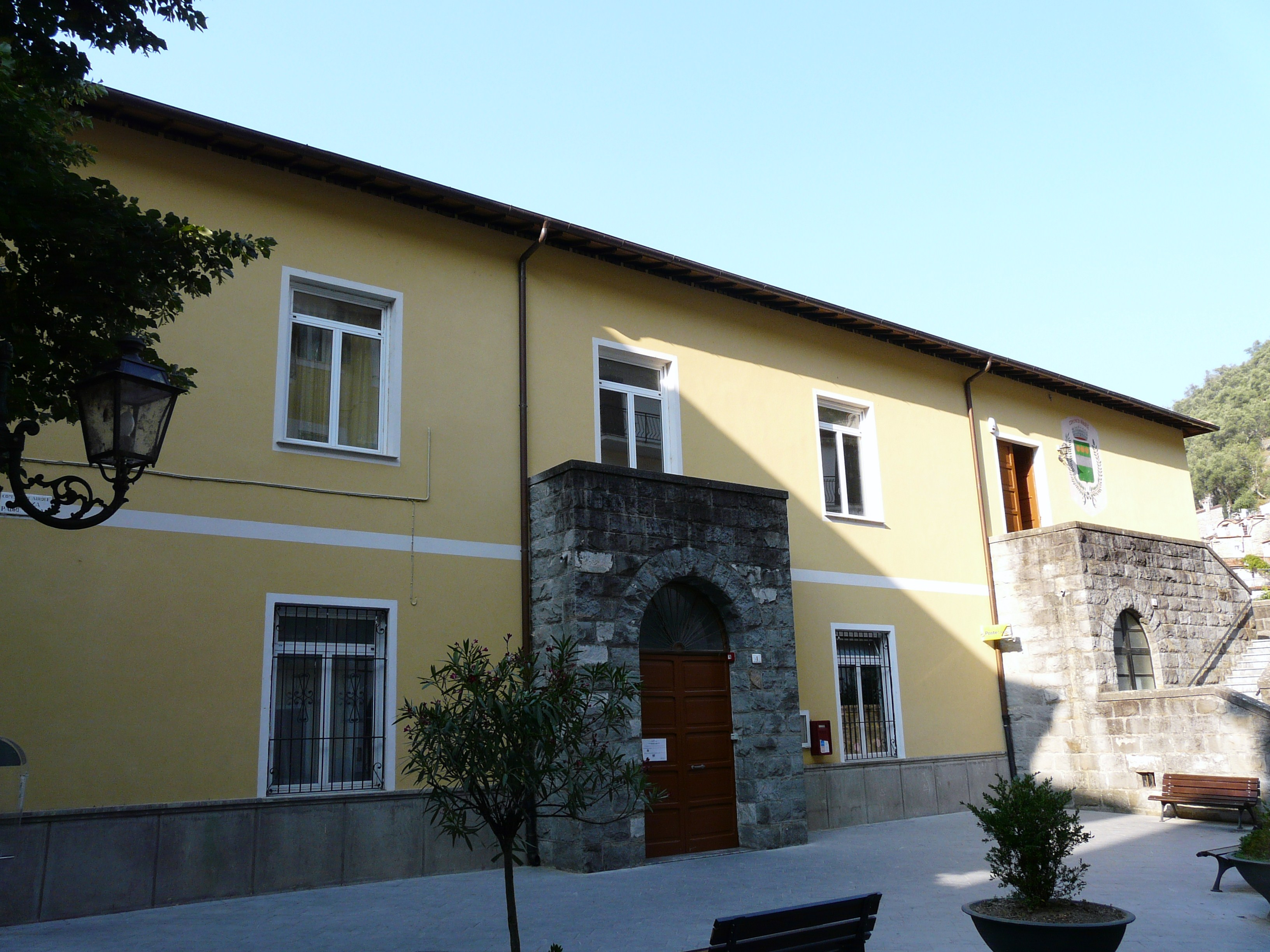 Municipio di Airole, Liguria, Italia